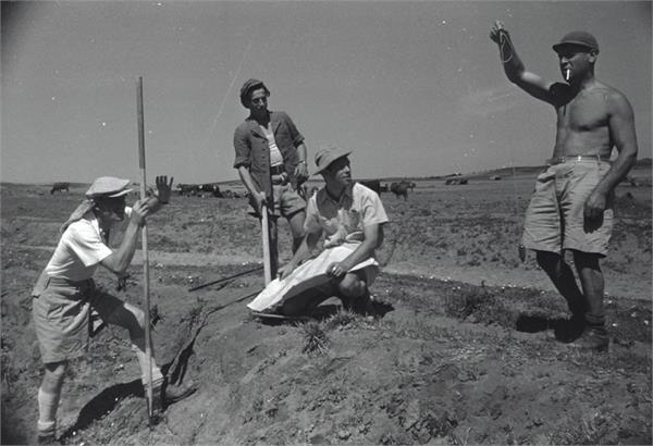 בני ציון - המודדים מסיימים את מדידת הקרקעות של "בני ציון"